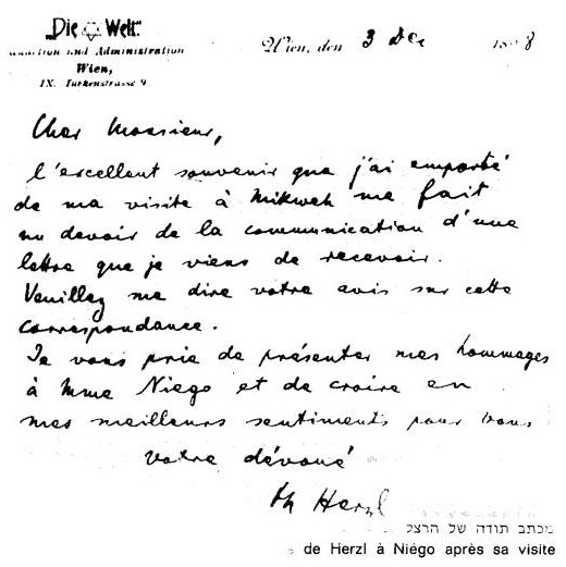 מכתב הערכה מהרצל ליוסף נייגו על עזרתו בהכנת הפגישה עם הקיסר הגרמני